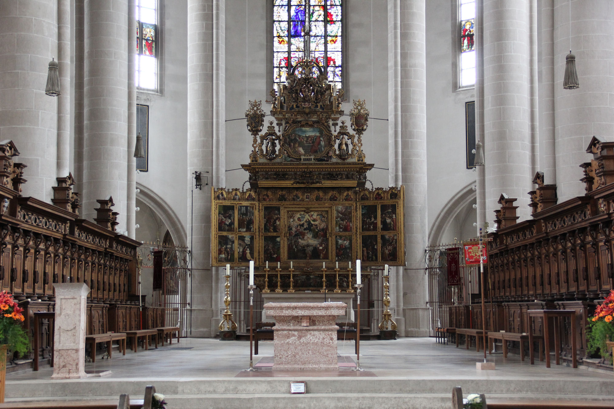 Minster of Our Lady Native nameMünster Zur Schönen Unserer Lieben FrauLocationIngolstadt, Upper Bavaria, GermanyCoordinates48° 45′ 51.3″ N, 11° 25′ 13.81″ E